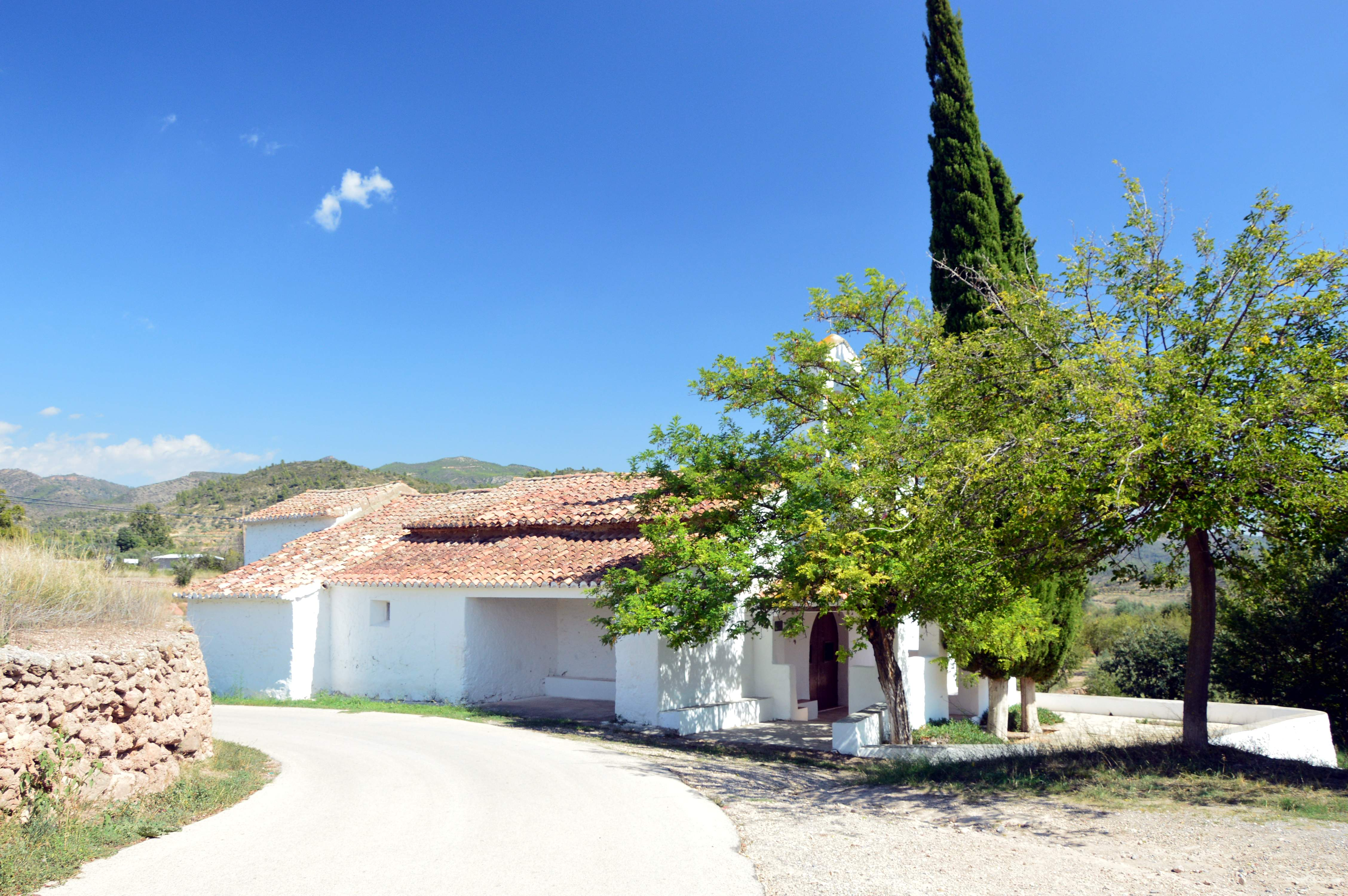 Vista general (noroccidental) de la Ermita de la Virgen de Loreto en Chelva (Valencia), 2018.